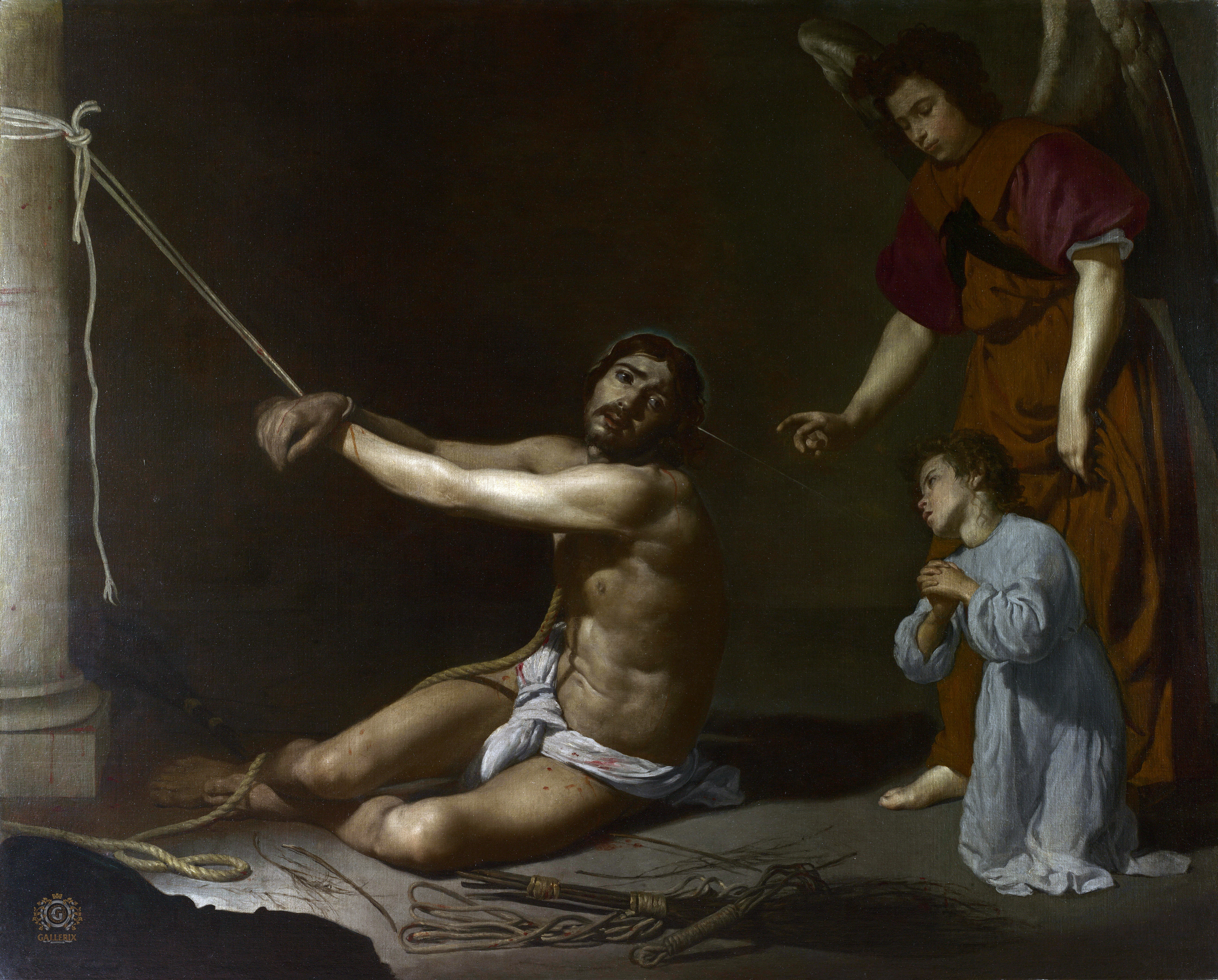 Velázquez: Crist lligat i l'ànima cristiana, 1625. Londres, National Gallery